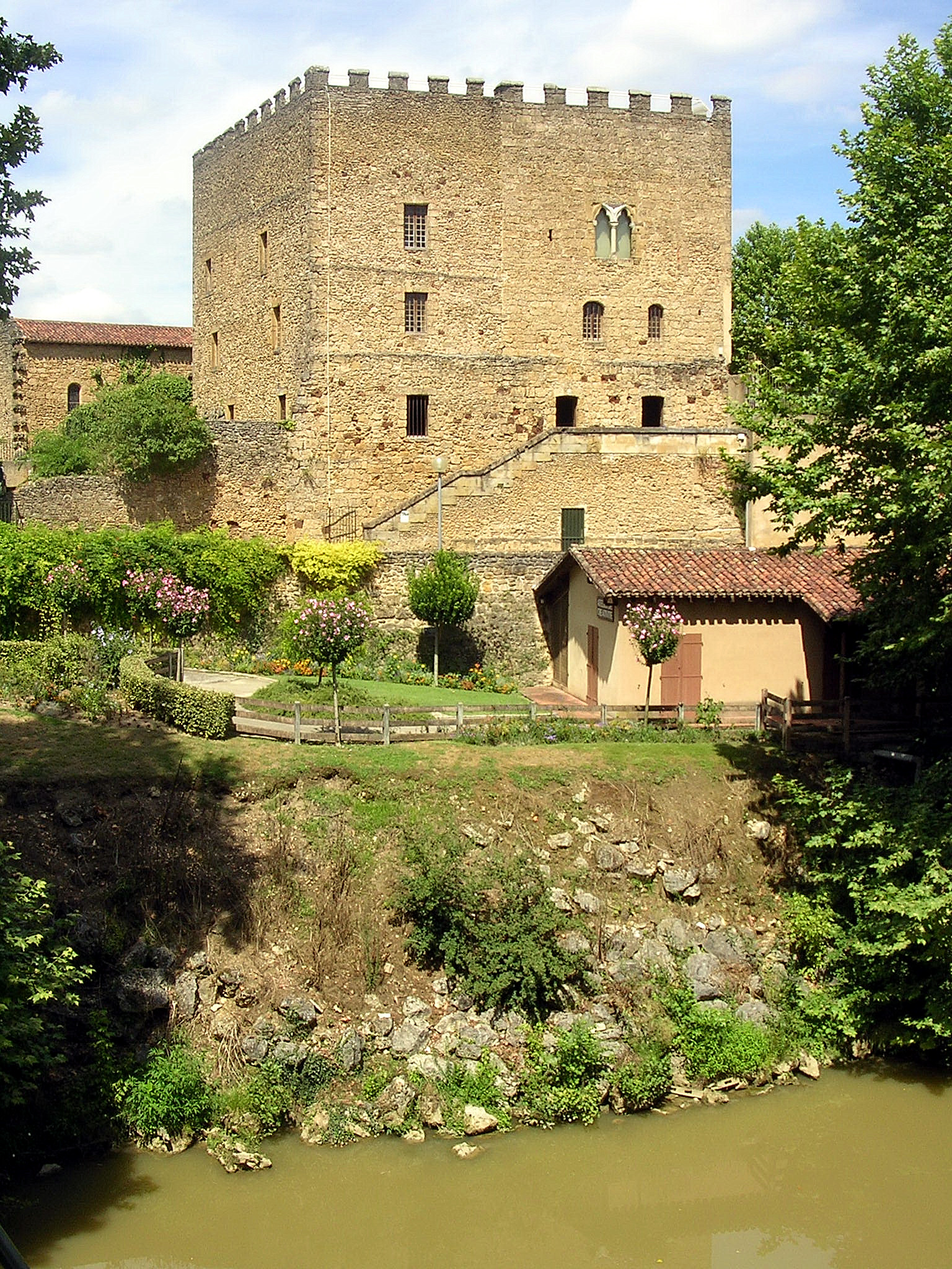 Donjon Lacataye, à Mont-de-Marsan, préfecture des Landes (France) Photo prise par Jibi44 en juillet 2006, au pied du Midou.